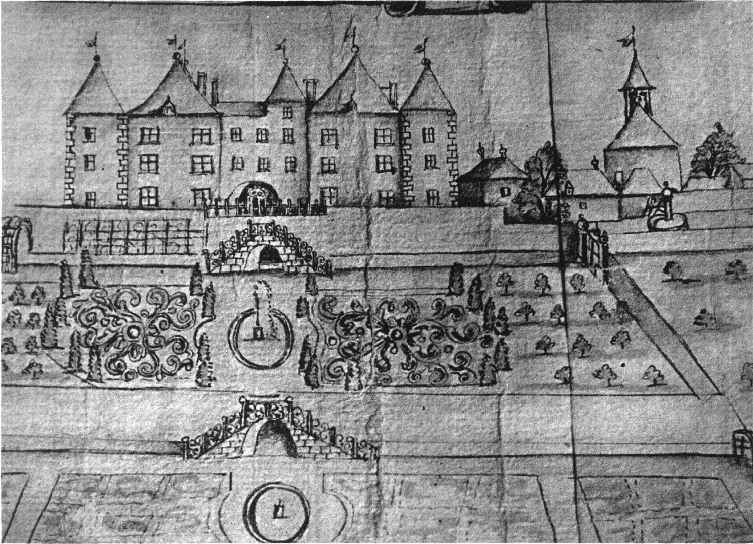 Schloss Dardagny, Zeichnung von Ph. Jamin